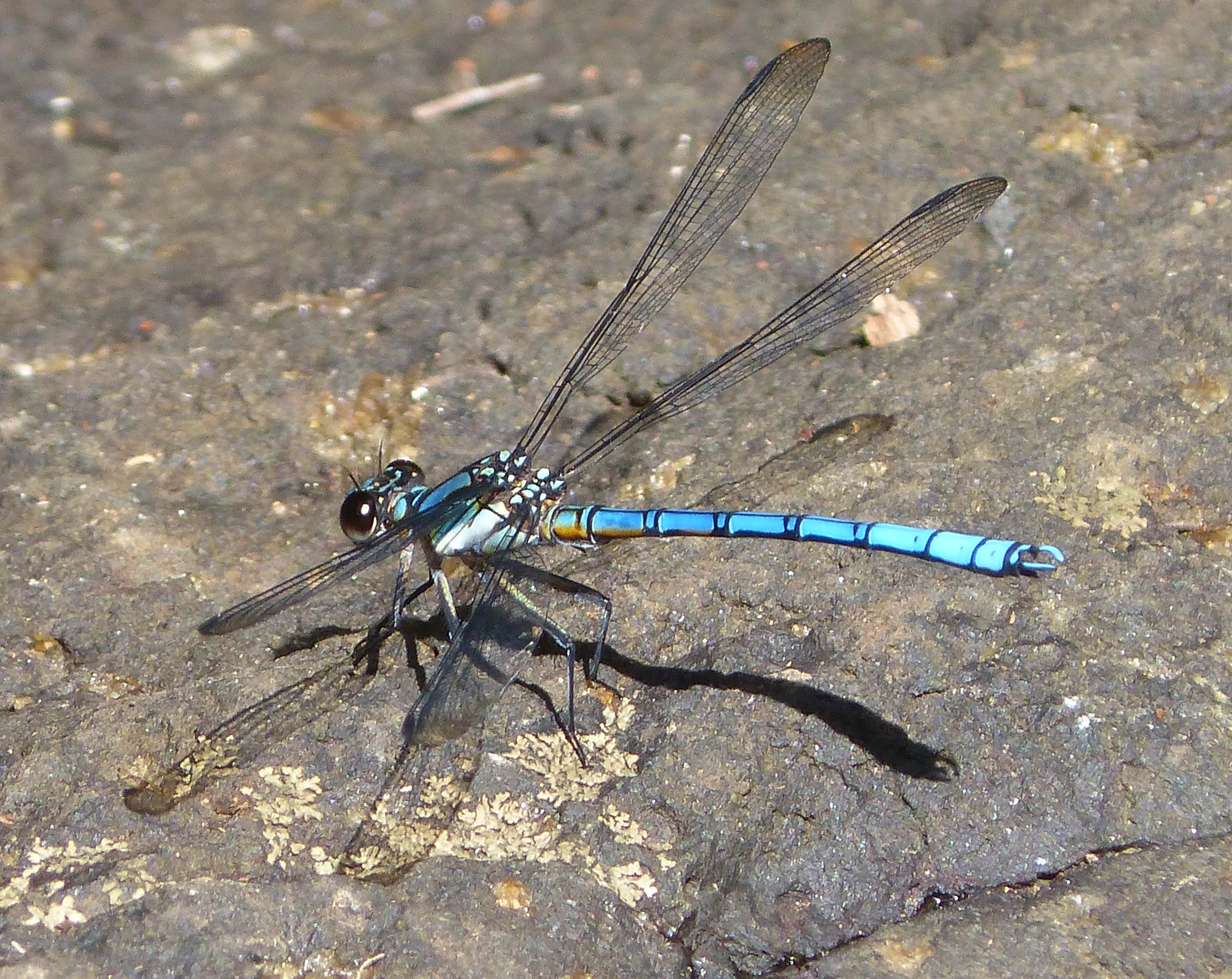 Springbrook Lamington N/P. QLD